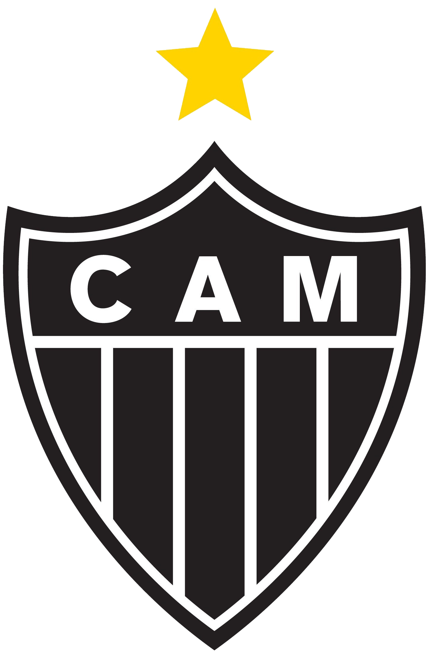 Logo: Clube Atletico Mineiro, Belo Horizonte (MG), Brazil.